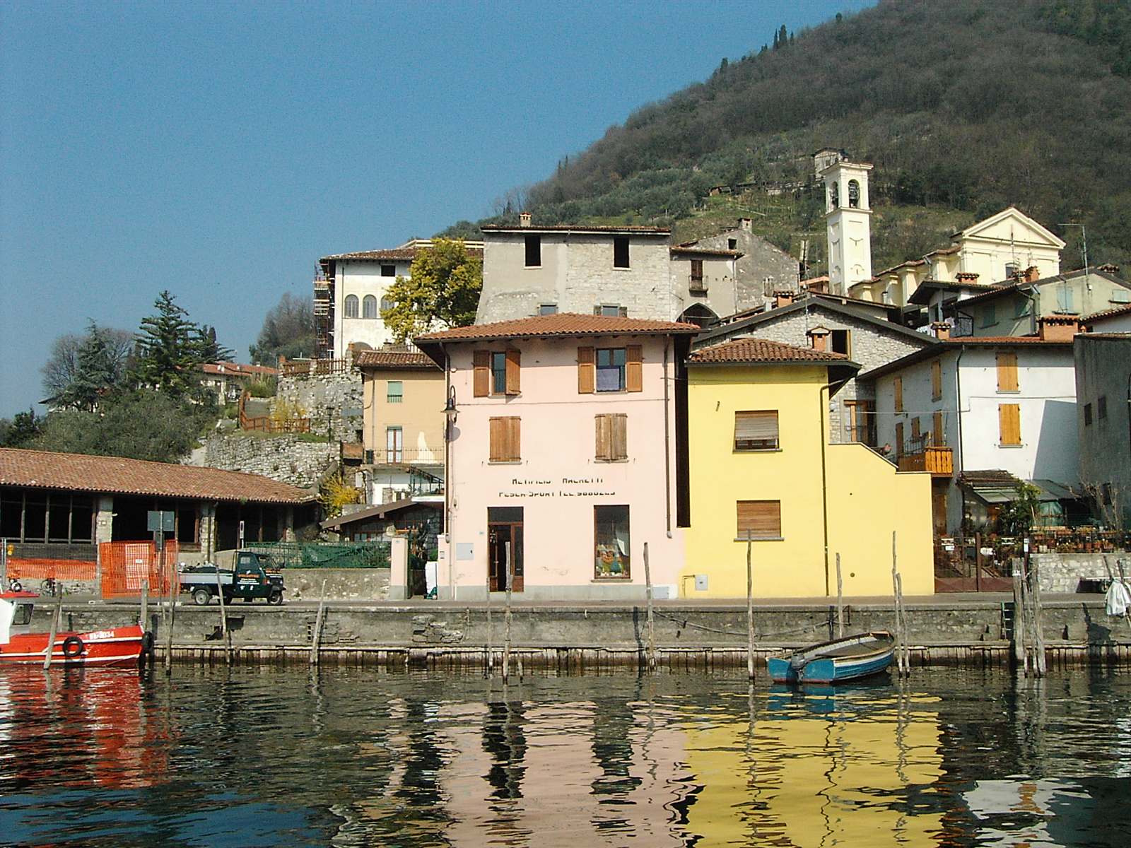 Vista di Peschiera Maraglio dal battello